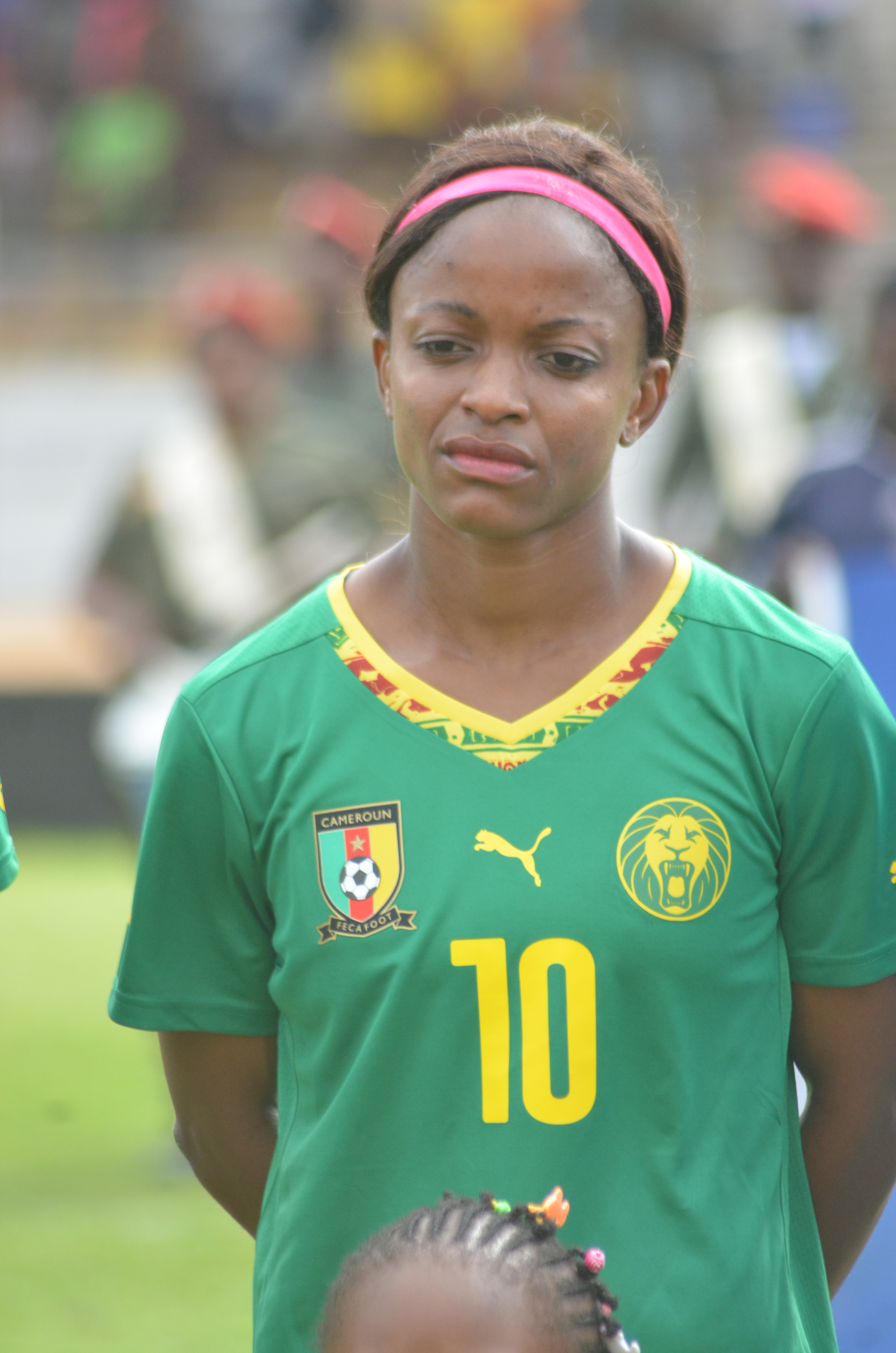 Attaquante de l'équipe de football du Cameroun